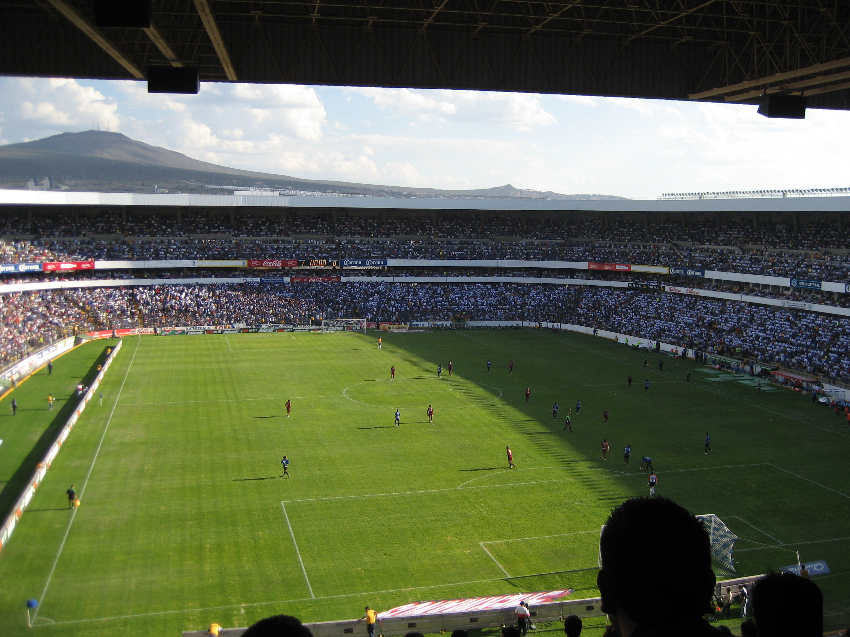 Fotografía del Estadio la Corregidora, durante el partido Querétaro-Morelia (4/abril/2007). Ciudad de Santiago de Querétaro, México Photograph of the Corregidora Stadium, during the soccer game Queretaro-Morelia (apr/04/2007). Santiago de Queretaro City, Mexico. Trabajo propio (Self)